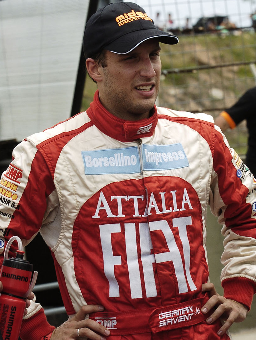 German Sirvent - Top Race V6 2013 - II.